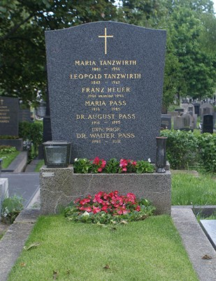 Grab Walter Pass-Hernalser Friedhof